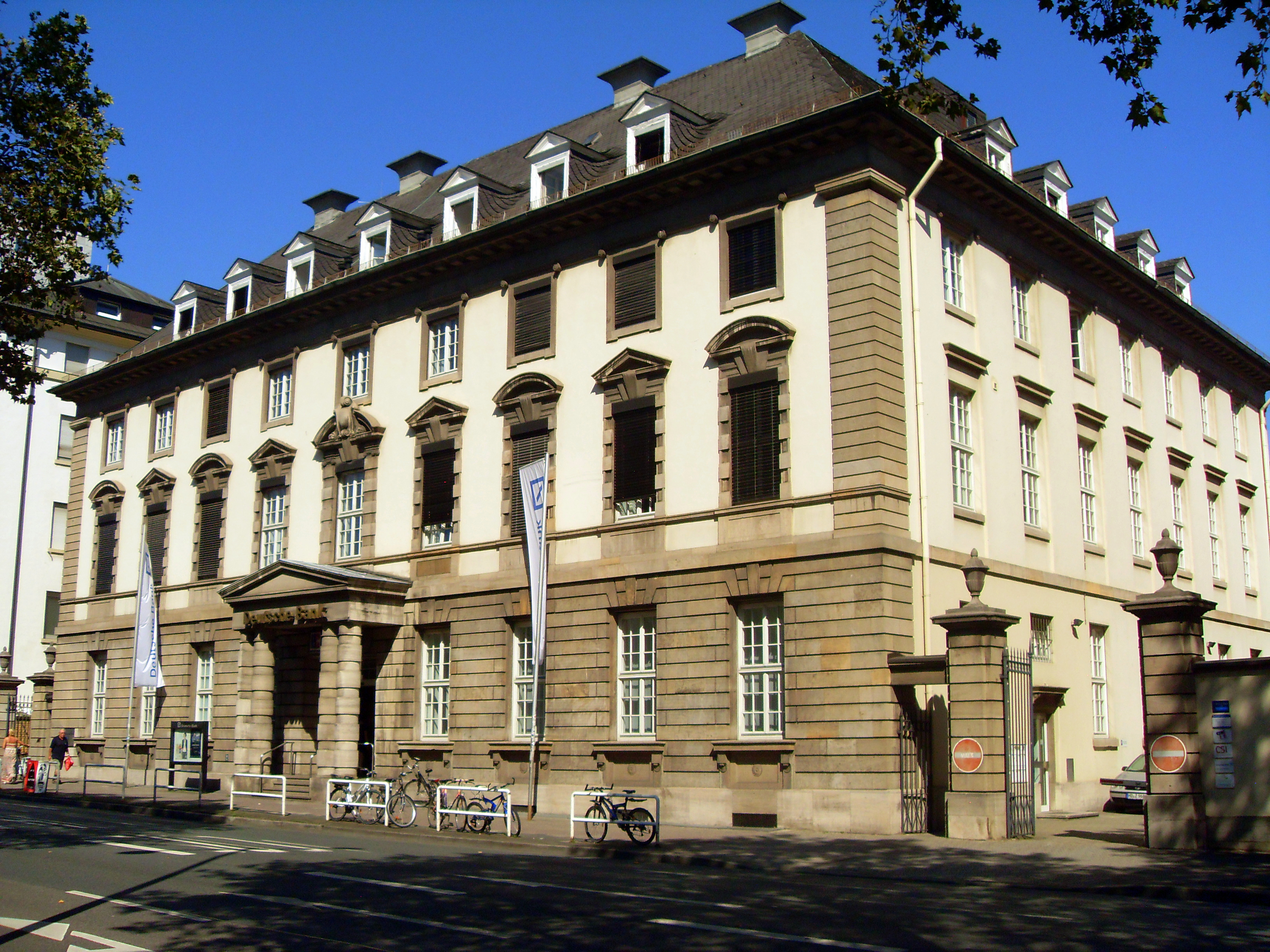 Deutsche Bank w Heidelbergu